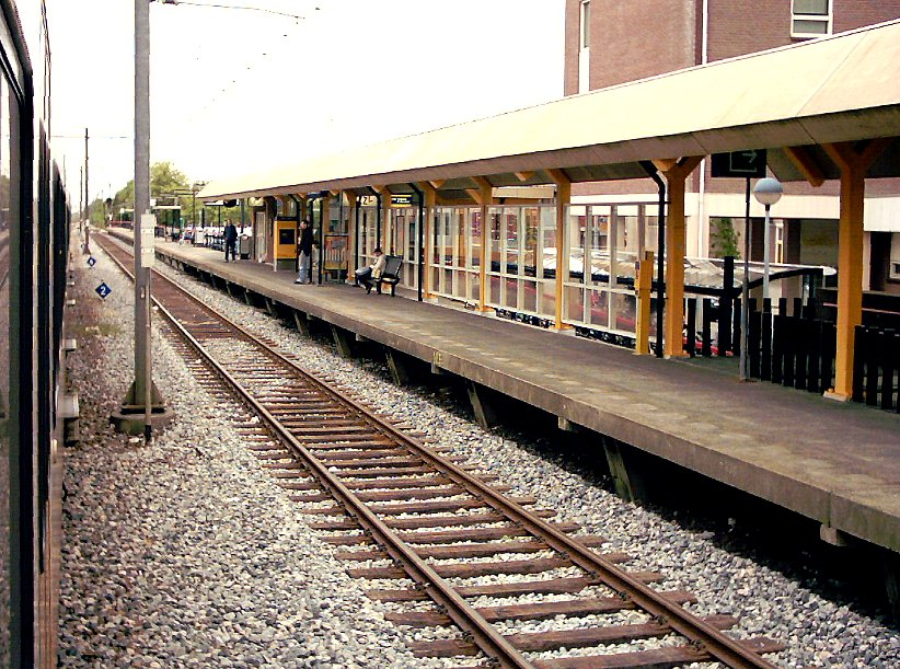 Station Hoorn Kersenboogerd